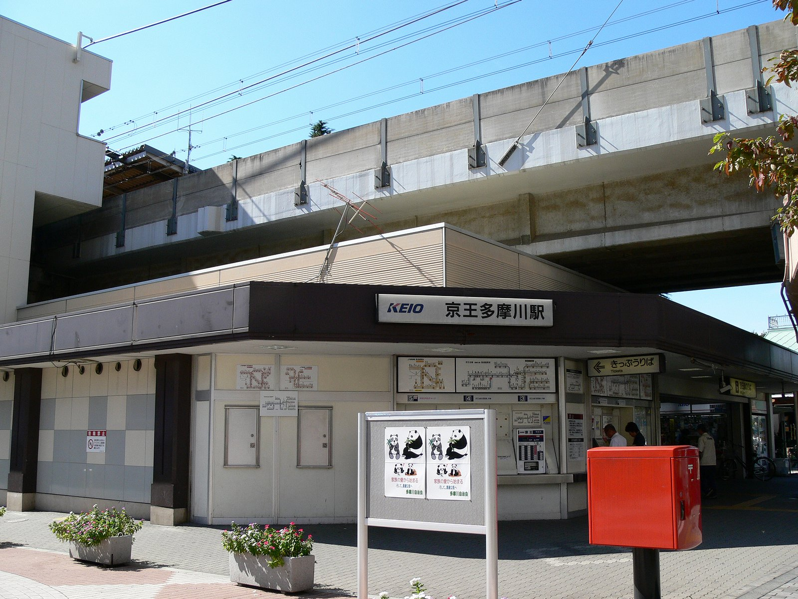 Keio-Tamagawa station.京王多摩川駅